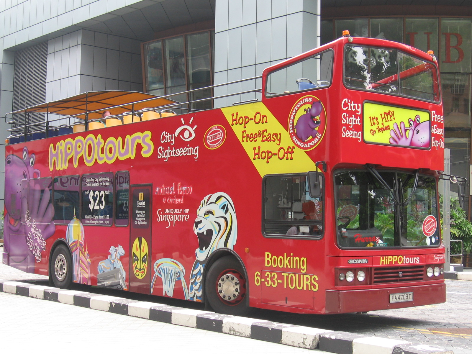 Hippo Bus, Singapore